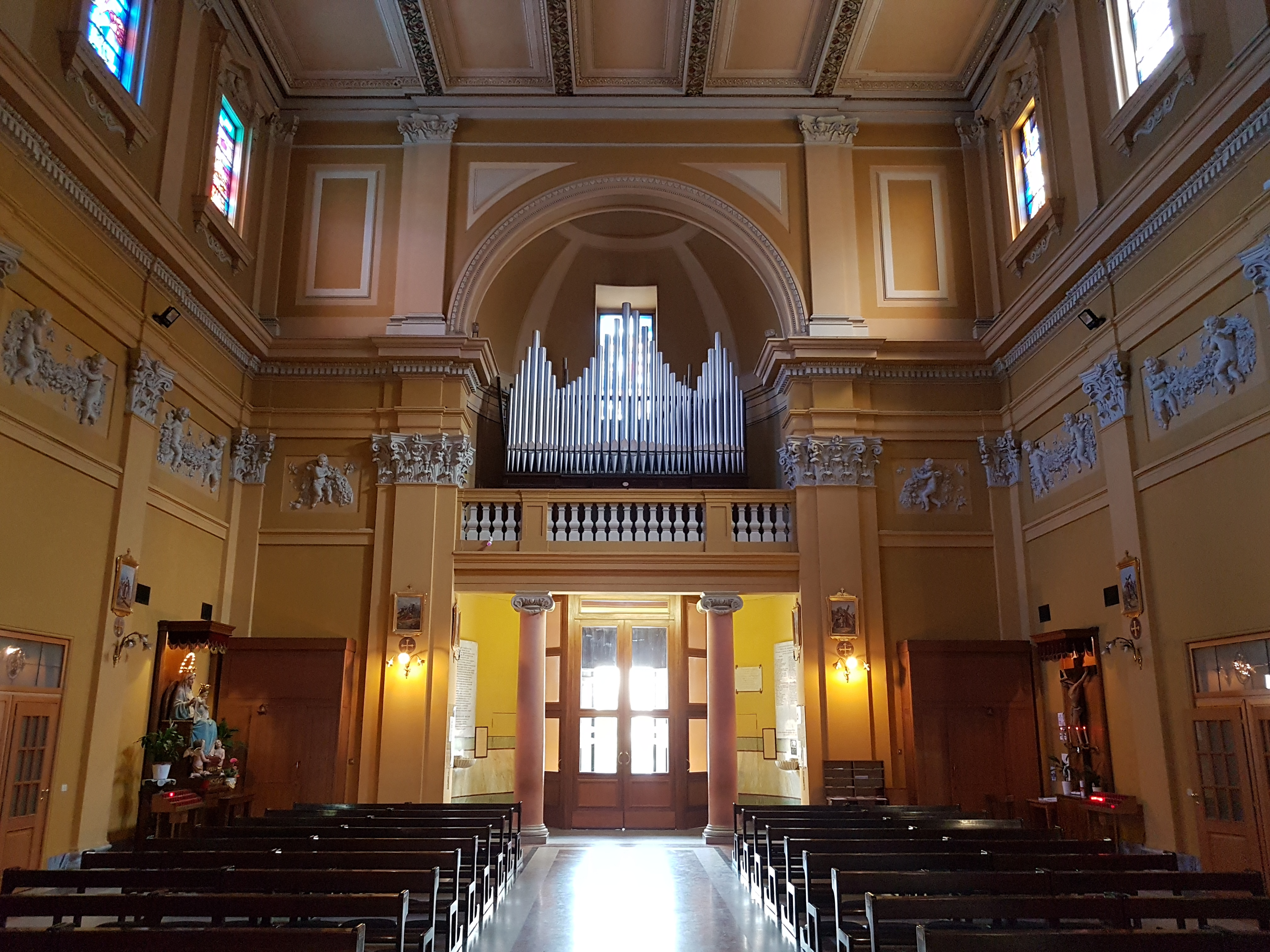 Santa Teresa in Panfilo (Rome), Innenraum mit Blick zur Empore